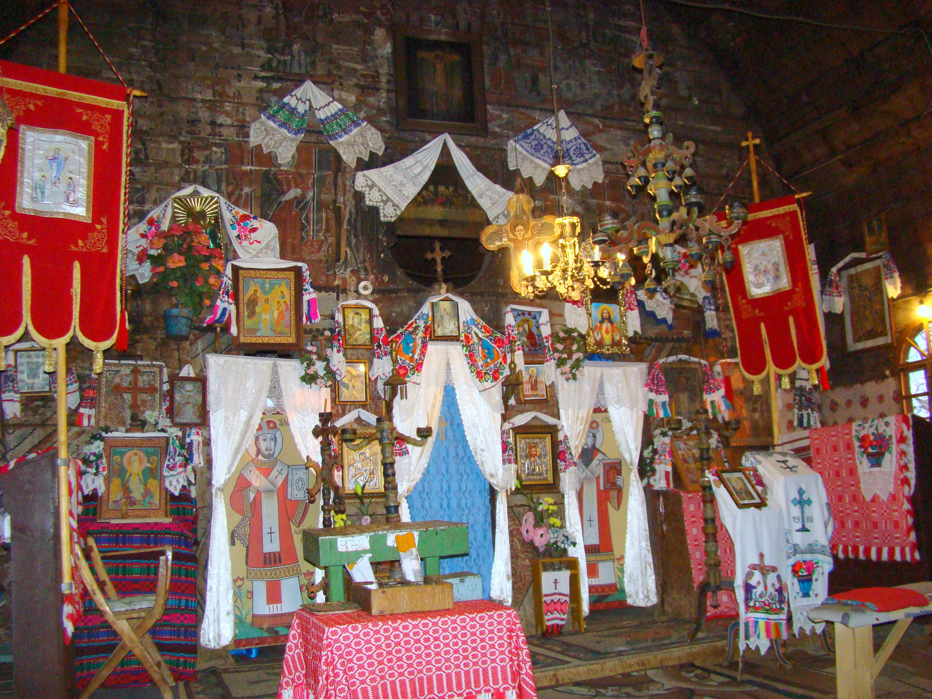 Biserica de lemn "Sf. Ioan Teologul", sat BRĂDET; comuna BUNTEŞTI